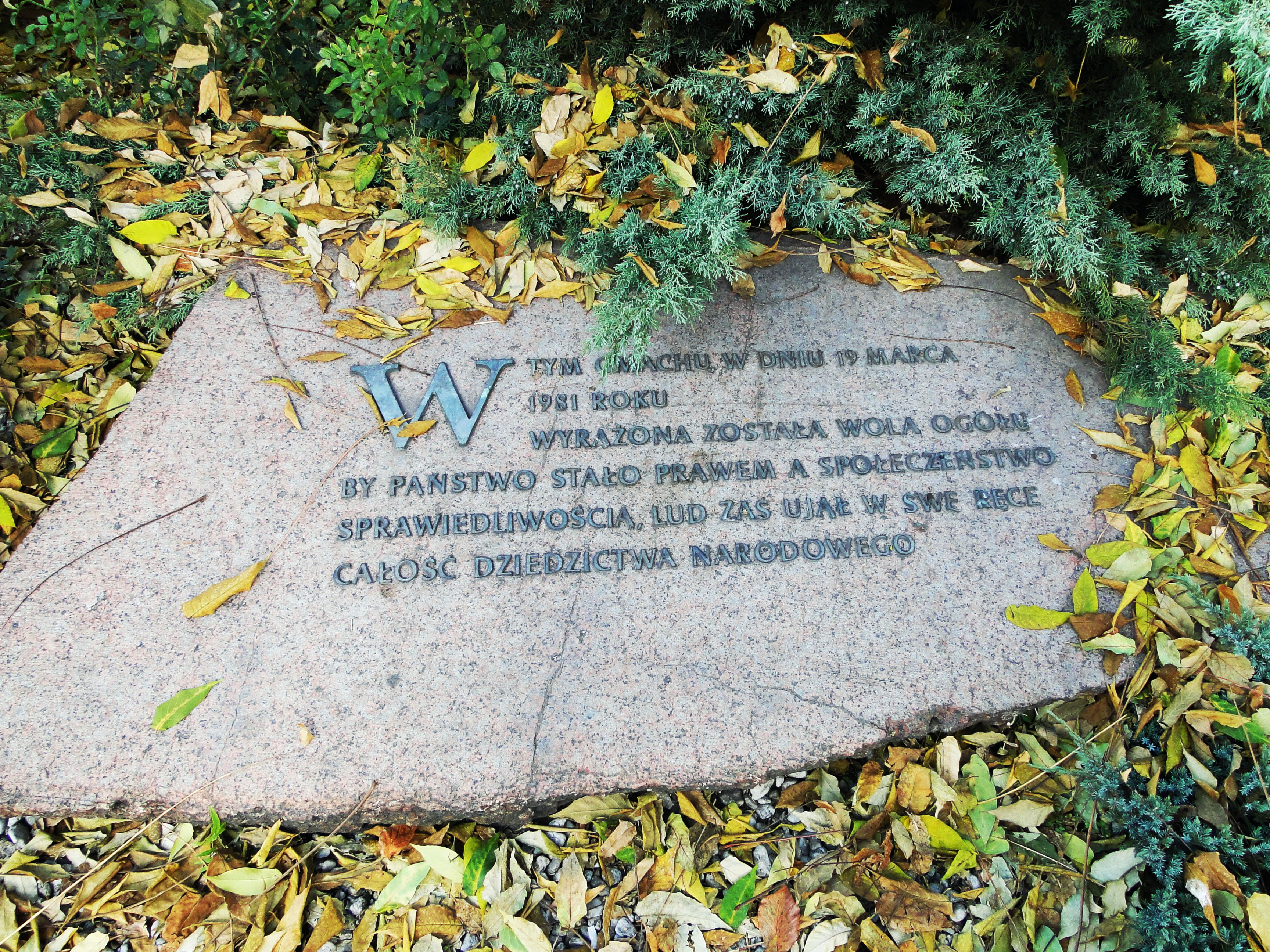 Pomnik upamiętniający wydarzenia bydgoskie - 19.03.1981